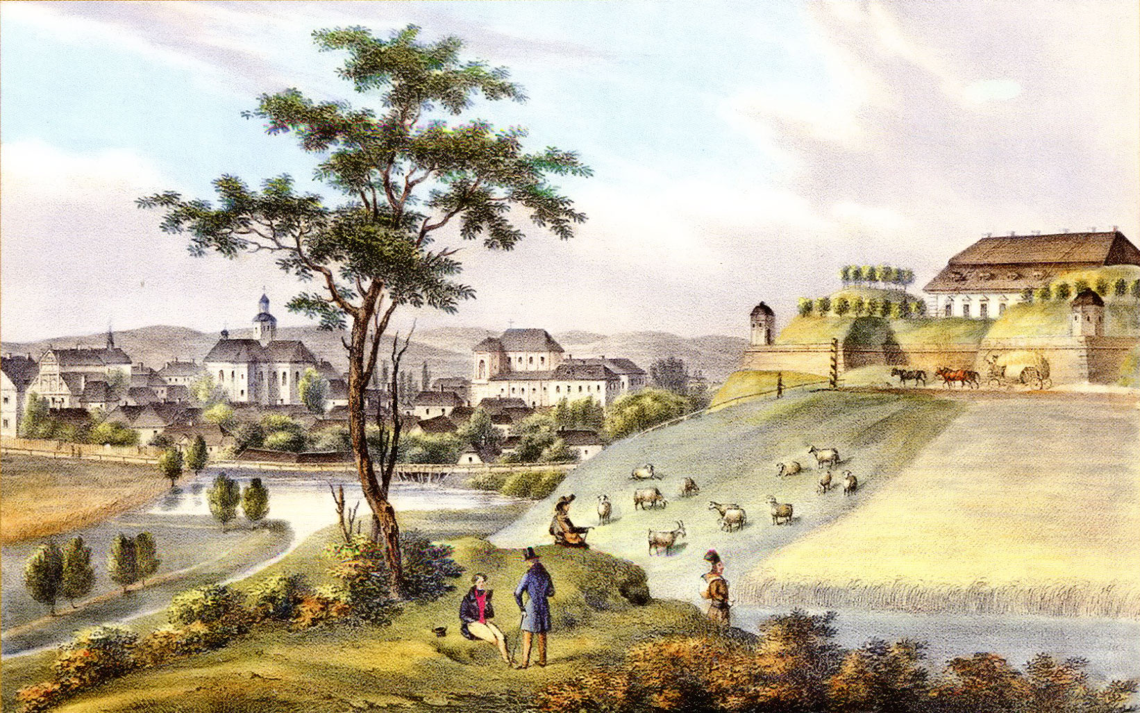 литография